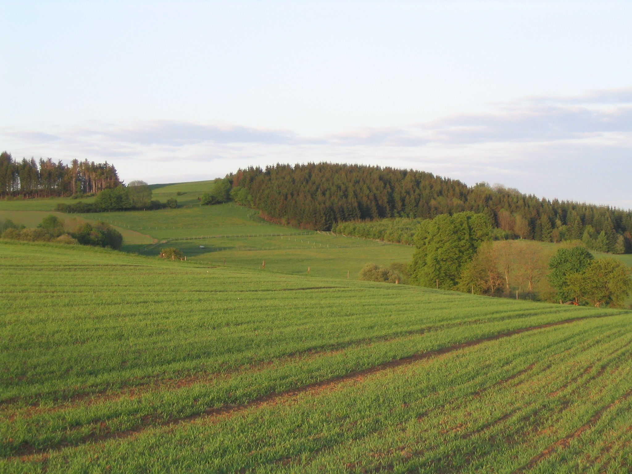 Das Völzberger Köpfchen (571 m) von Westen, aufgenommen vom Vogelsberger Südbahnradweg